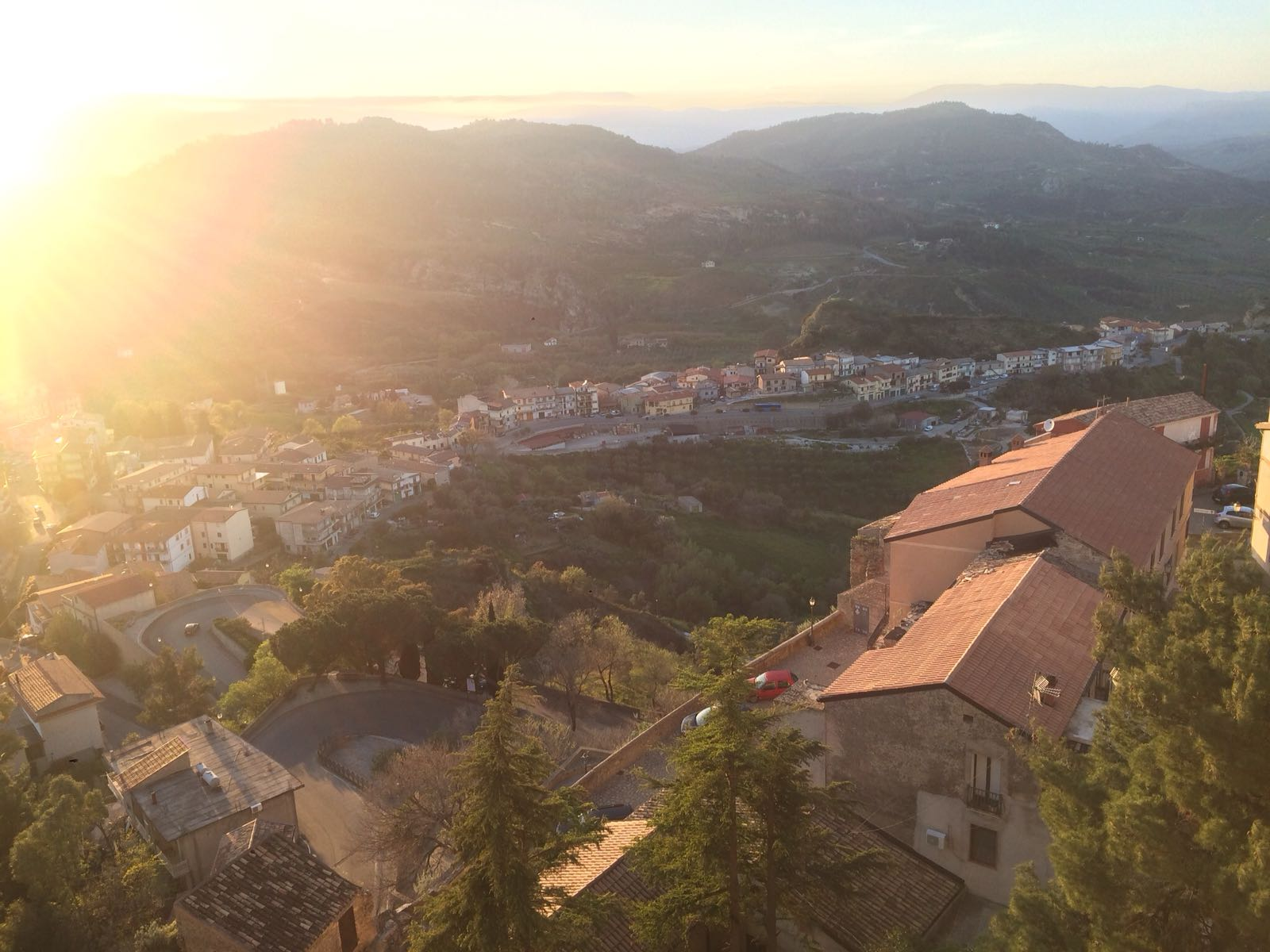 La frazione Altilia di Santa Severina (KR) vista dal castello Carafa